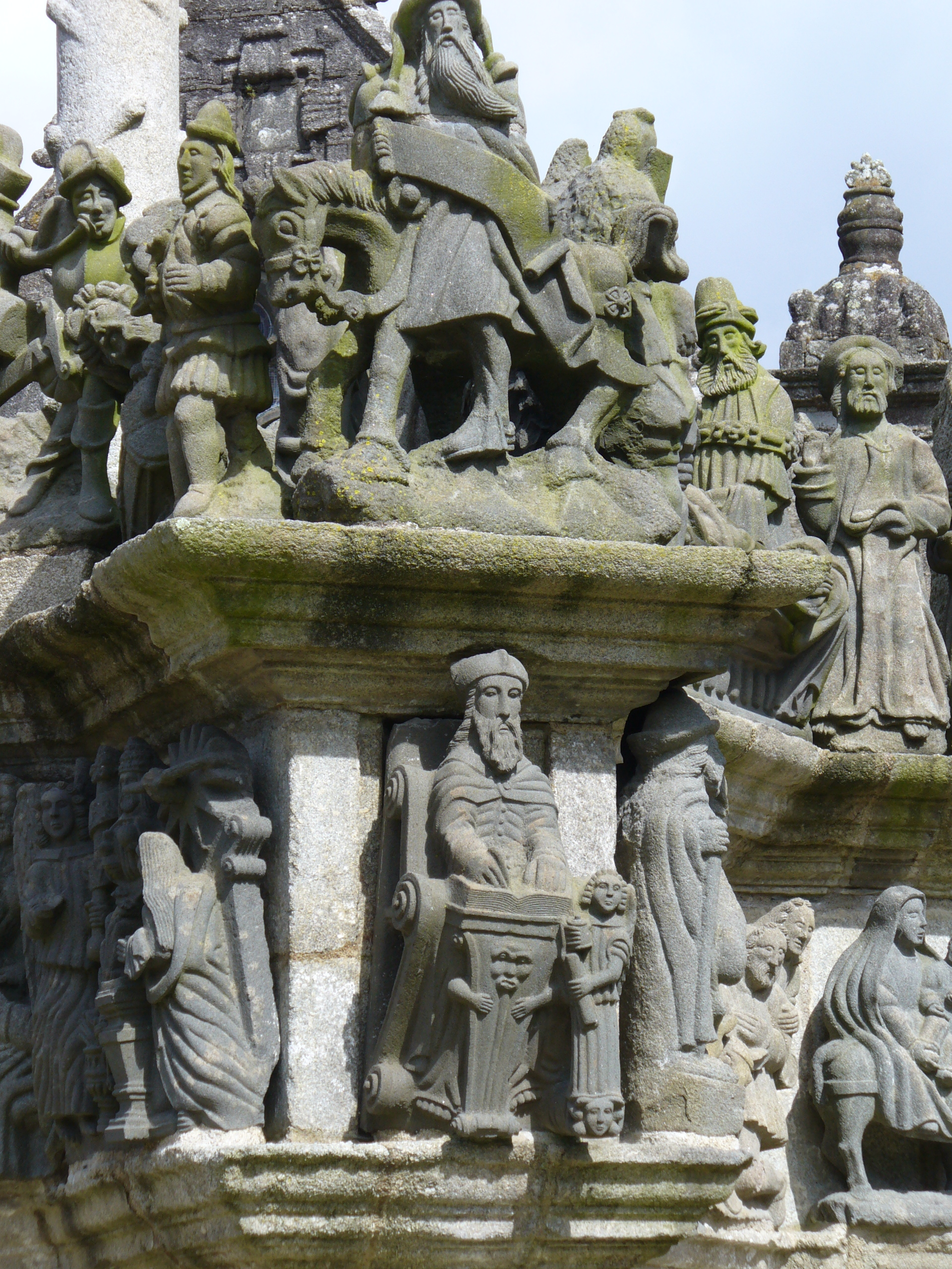 Calvaire-Kalvarienberg von Saint Miliau in Guimiliau zwischen 1581 und 1588 errichtet zeigt mit insgesamt 200 Figuren 17 Passionsszenen im Turm und im Fries 15 Szenen aus dem Leben Jesu-Enclos Paroissal-Umfriedeter Pfarrbezirk